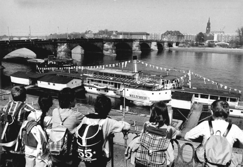 Dresden, "Weiße Flotte", Ausflugsschiff ADN-ZB Häßler 25.4.1987 Dresden: "Weiße Flotte"-Fünf Schiffe der "Weißen Flotte" starteten auf der Oberelbe in Dresden in die Saison. Mit Wochenbeginn nehmen sie wieder den Linienverkehr zwischen Dresden und Schmilka auf. Köche, Kellner und Dufettiers sind auf den Besucherandrang vorbereitet. Über eine Million Fahrgäste werden in dieser Saison erwartet.